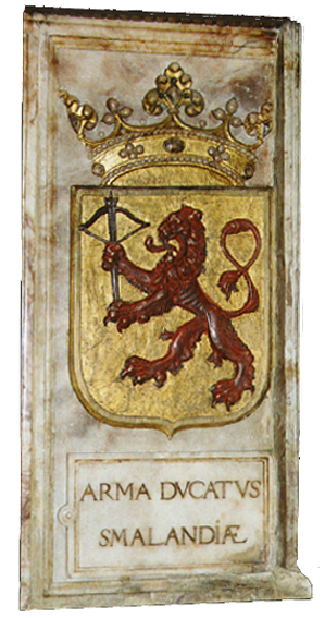 Smålands landskaps vapen vid Gustav vasas grav